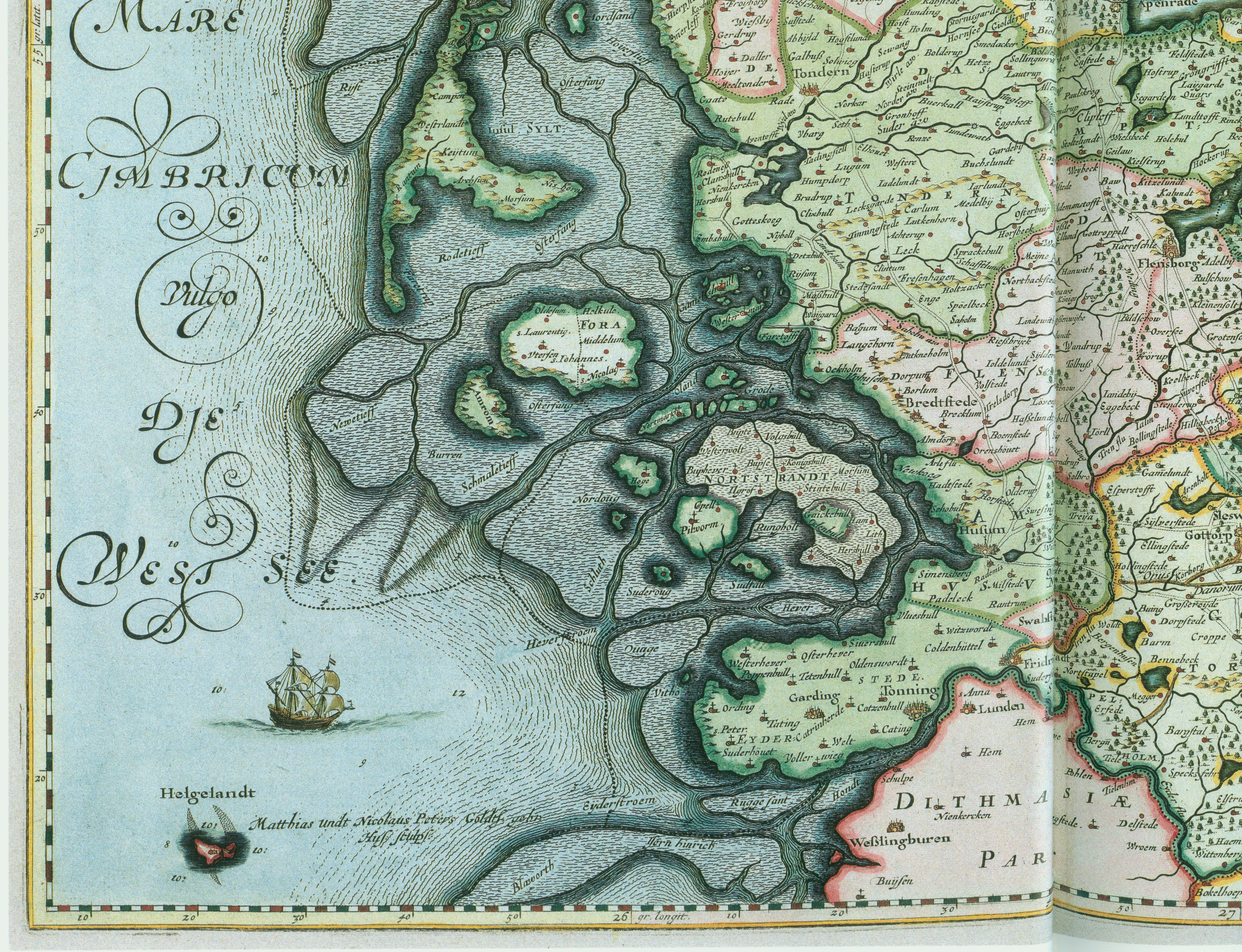 Herzogtümer Schleswig oder Südjütlandg gestochen von den Gebrüdern Matthias und Nicolaus Peters Goldschmiede aus dem Zimbrischen Husum (Teil unten-links)